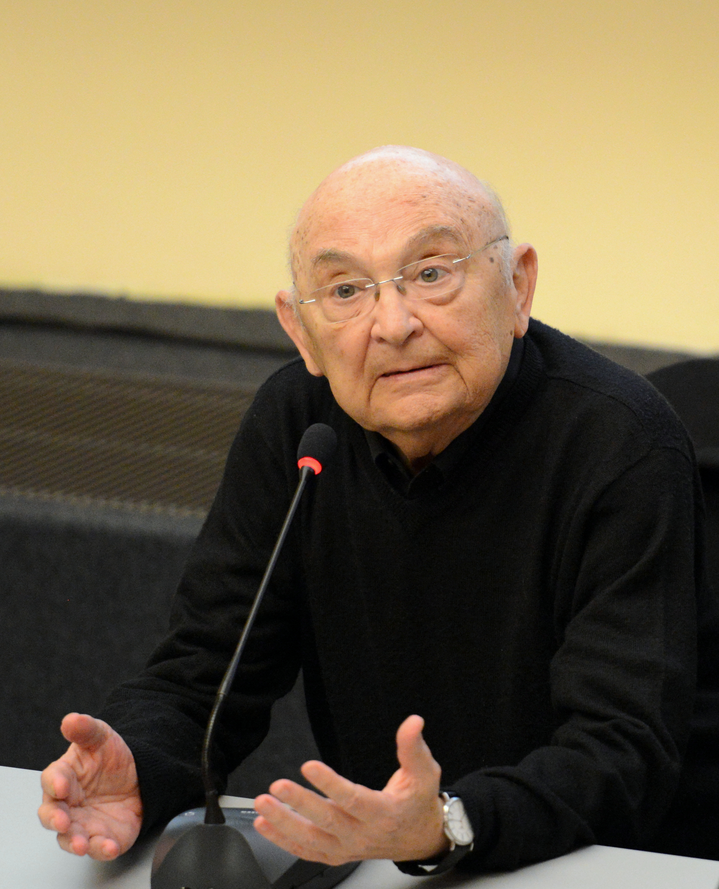 "Aharon Appelfeld, Rencontre et entretien Marc Rettel". Den Aharon Appelfeld am Espace culturel Cité, 22. Mee 2014.